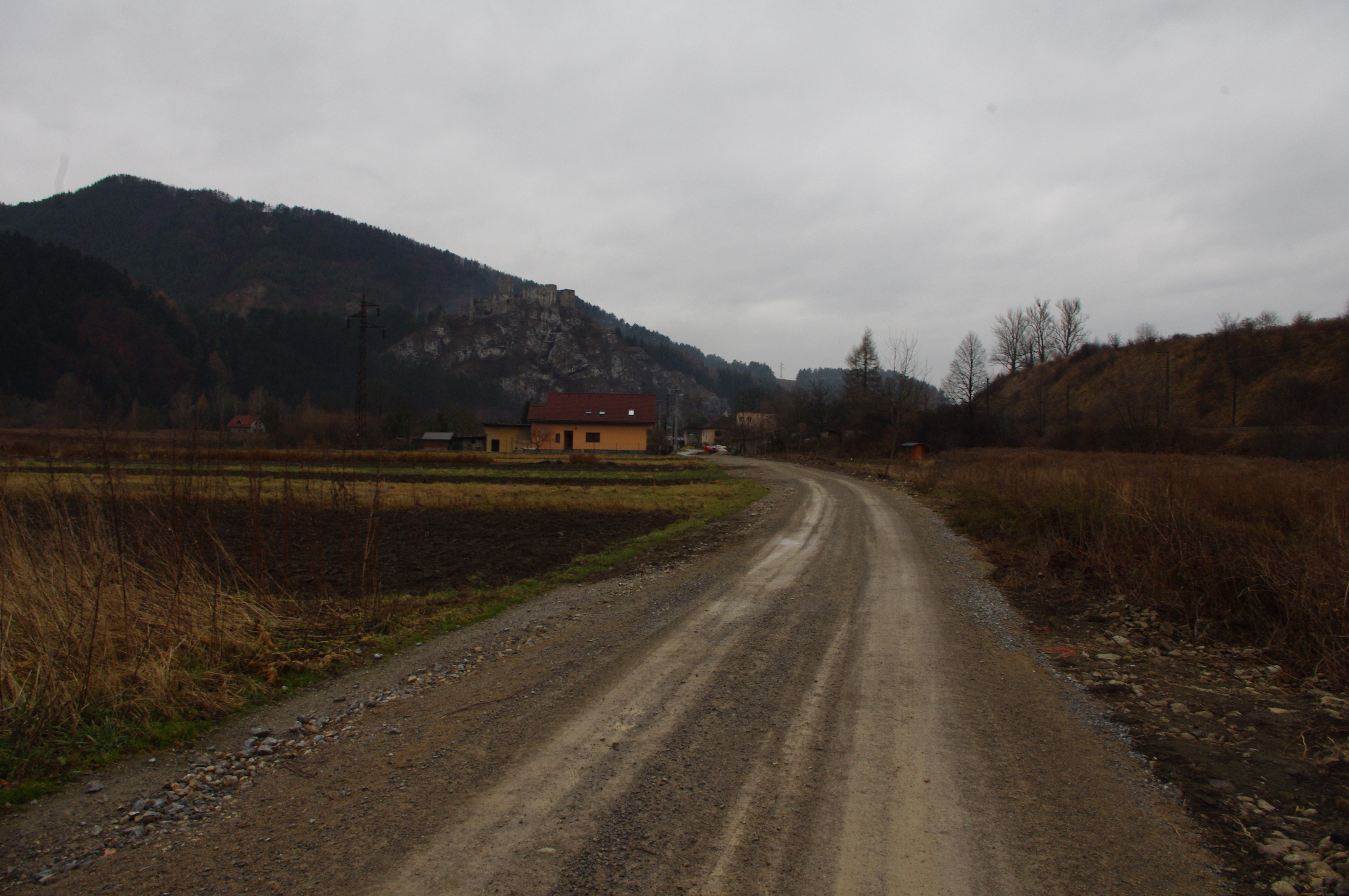 Nezbudská Lúčka 05.12.2011